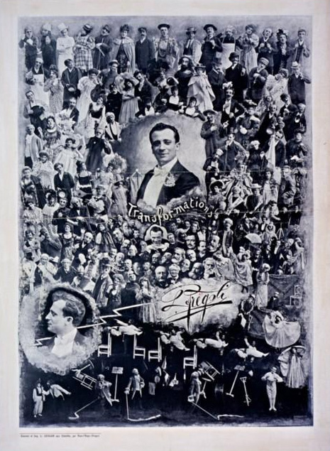 Transformations L. Frégoli. Affiche de Louis Geisler sc.